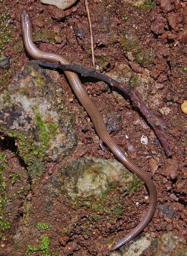 Lygosoma quadrupes. From Darmaga, Bogor, West Java, Indonesia